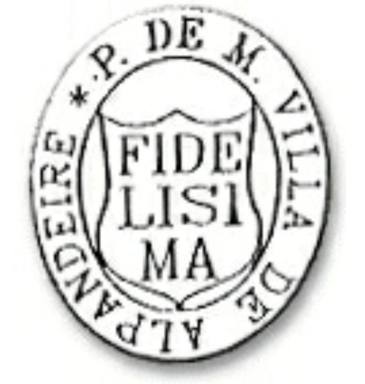 Escudo Municipal